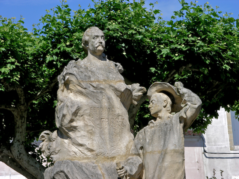 Statue de Ferdinand Fabre à Bédarieux (Hérault), sa ville natale. Sculpture de Jacques Villeneuve